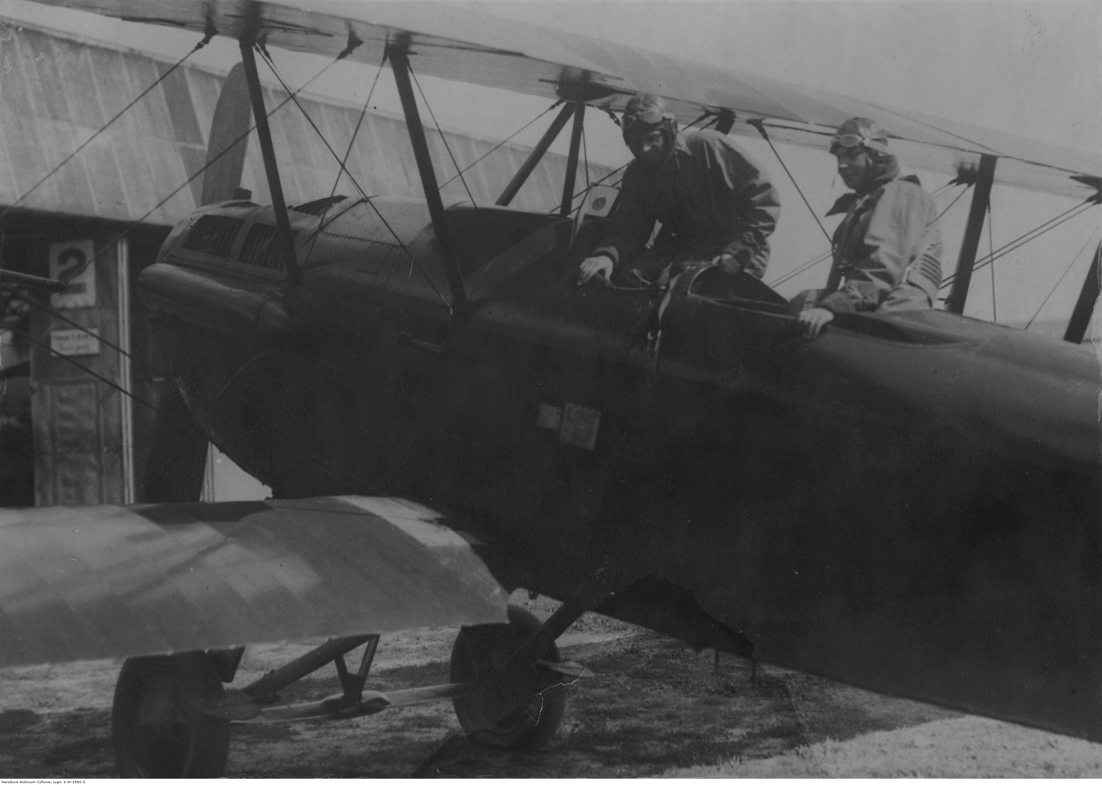 Dwaj lotnicy 3 pułku lotniczego w Poznaniu wsiadają do samolotu Potez XXV A2. Koncern Ilustrowany Kurier Codzienny - Archiwum Ilustracji. Sygnatura: 1-W-1582-2